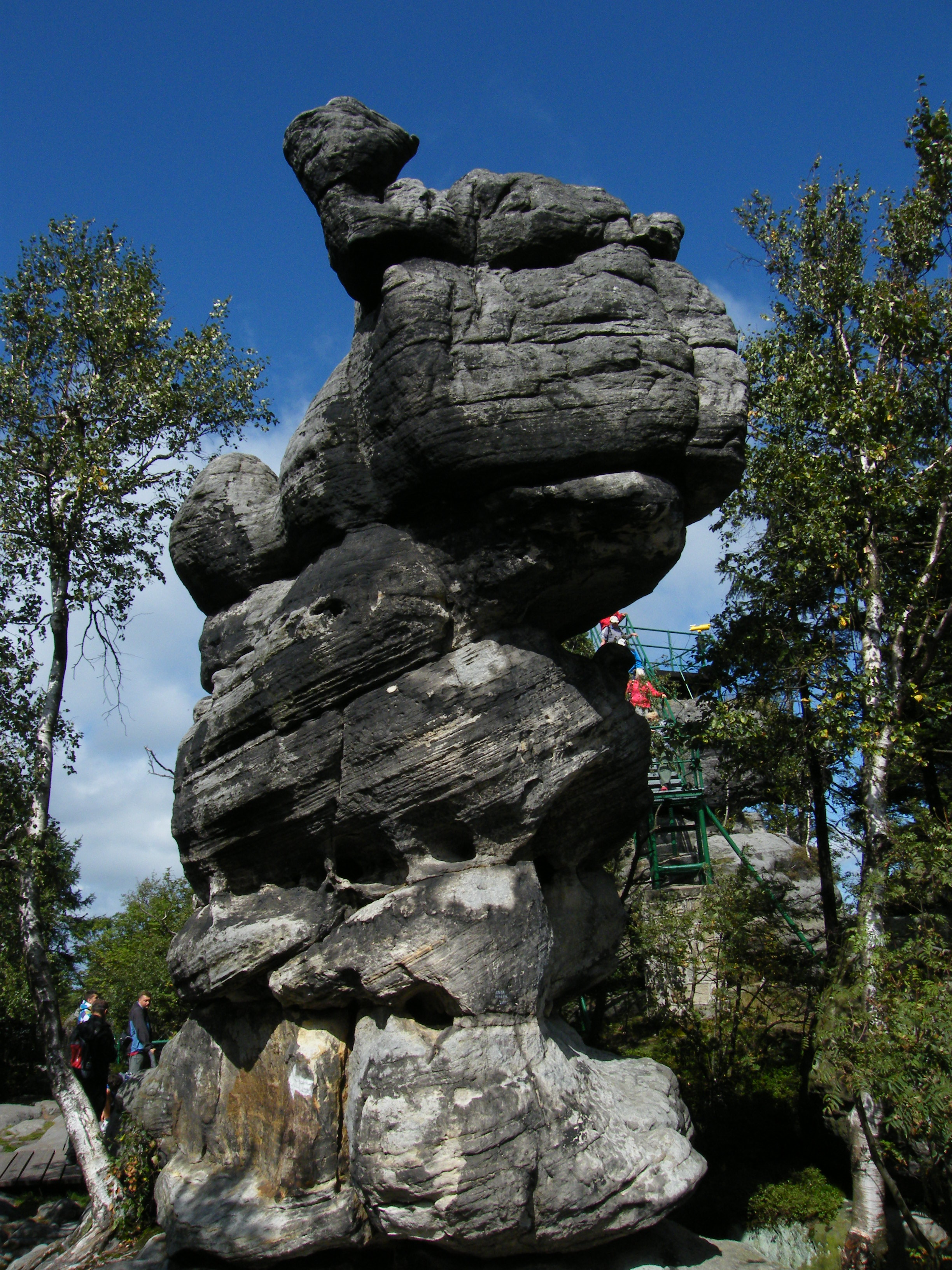 Góry Stołowe, Szczeliniec, Żyrafa